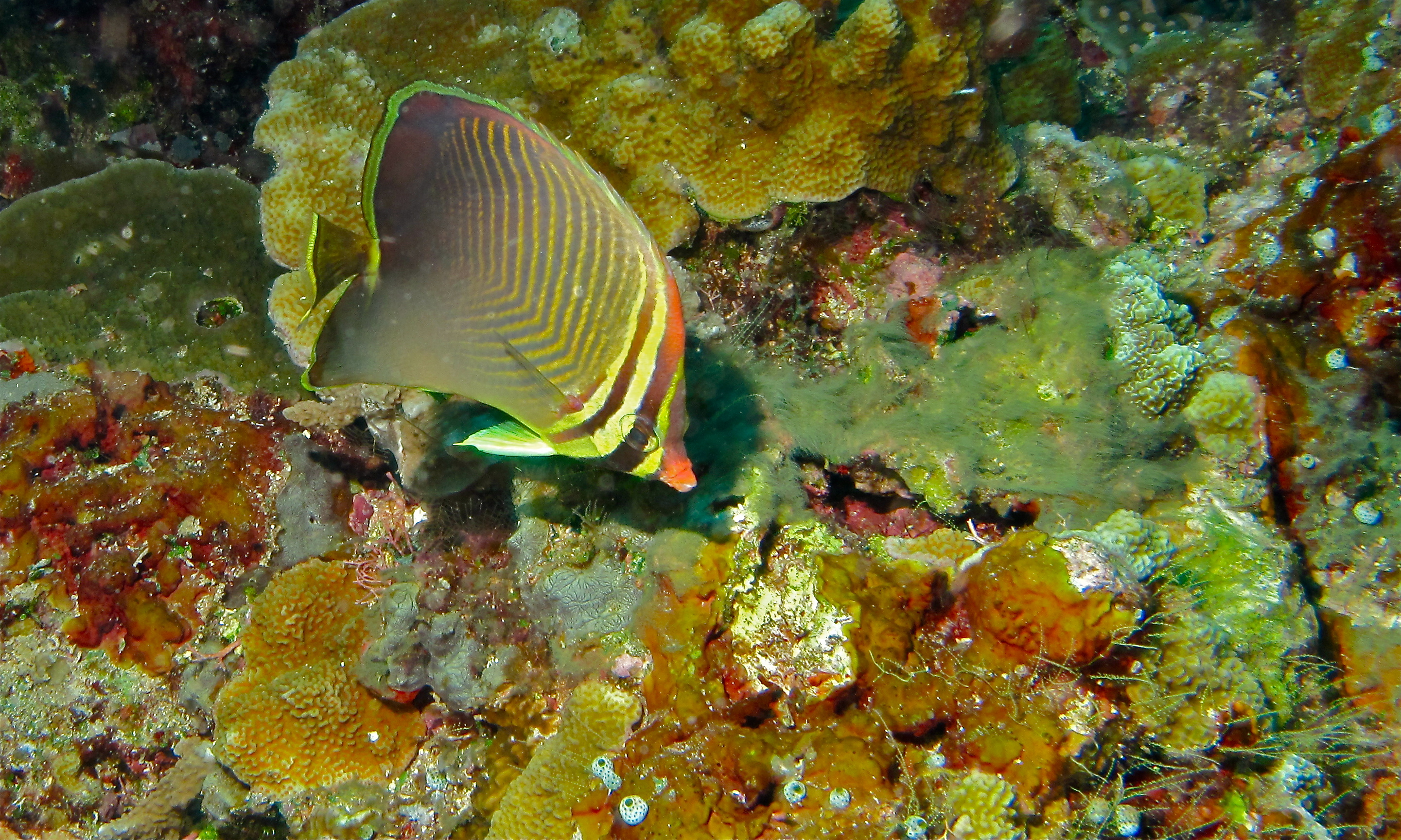 Mandoline, Bunaken Island, Sulawesi, INDONESIA